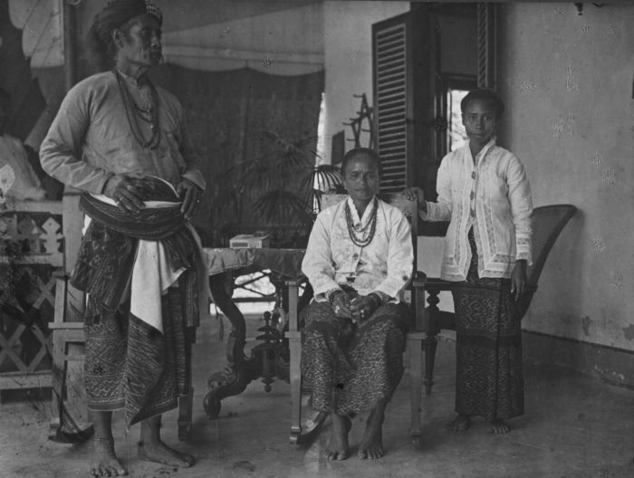 Foto. Portret van de Raja van Amarasi, Isaac van Baven, met twee vrouwen